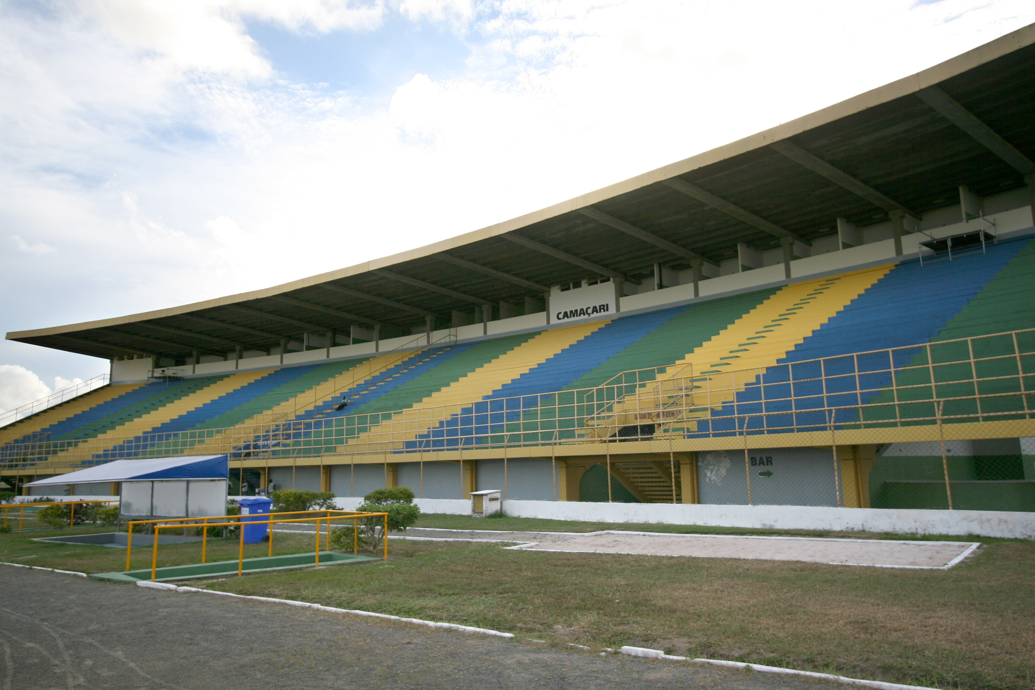 Comitê Organizador Local da Copa do Mundo 2014 realiza vistoria em estádios baianos Na foto: Estádio Armando Oliveira, Camaçari. Foto: Ronaldo Silva/AGECOM